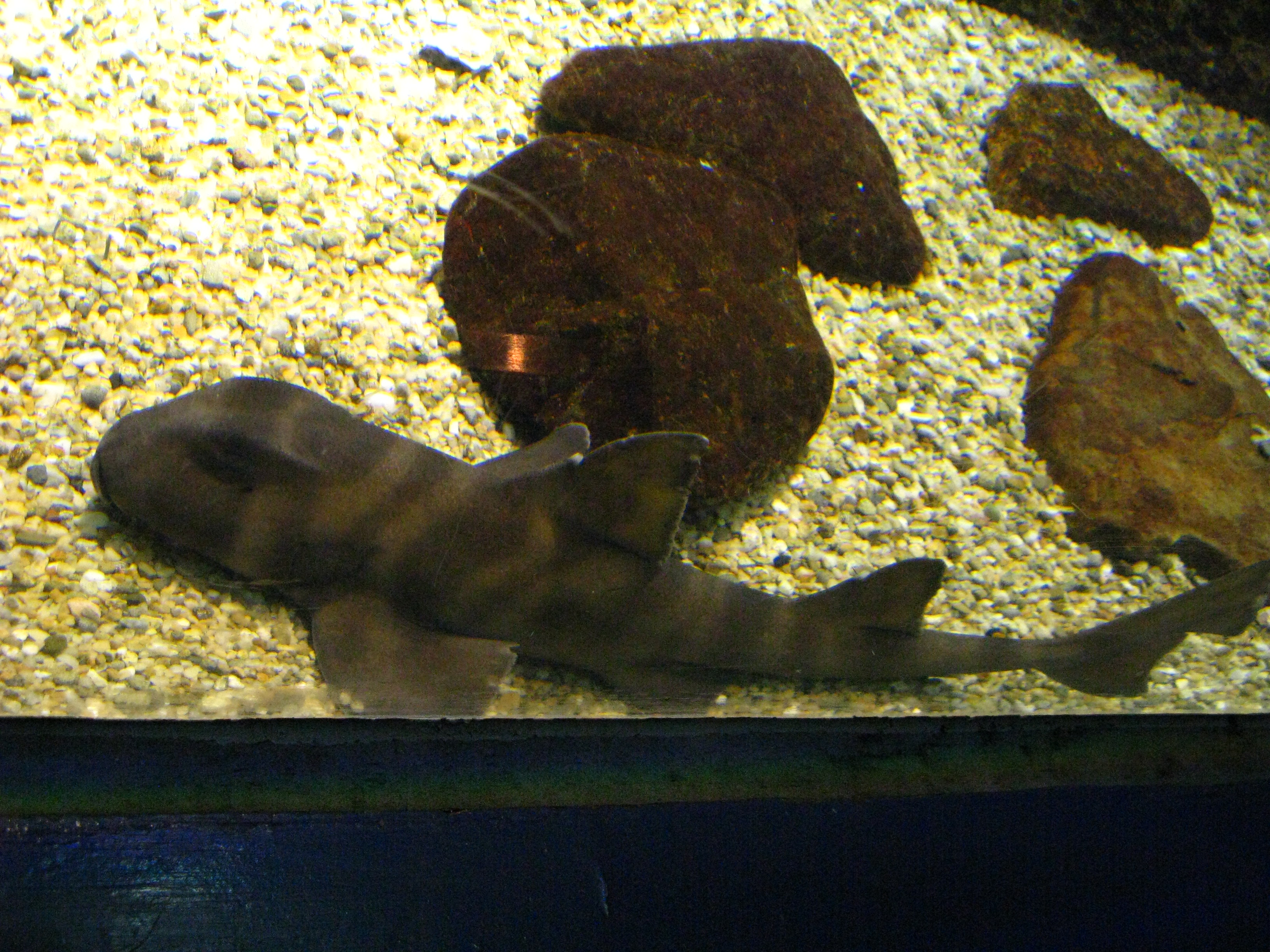 Scientific name Heterodontus japonicus